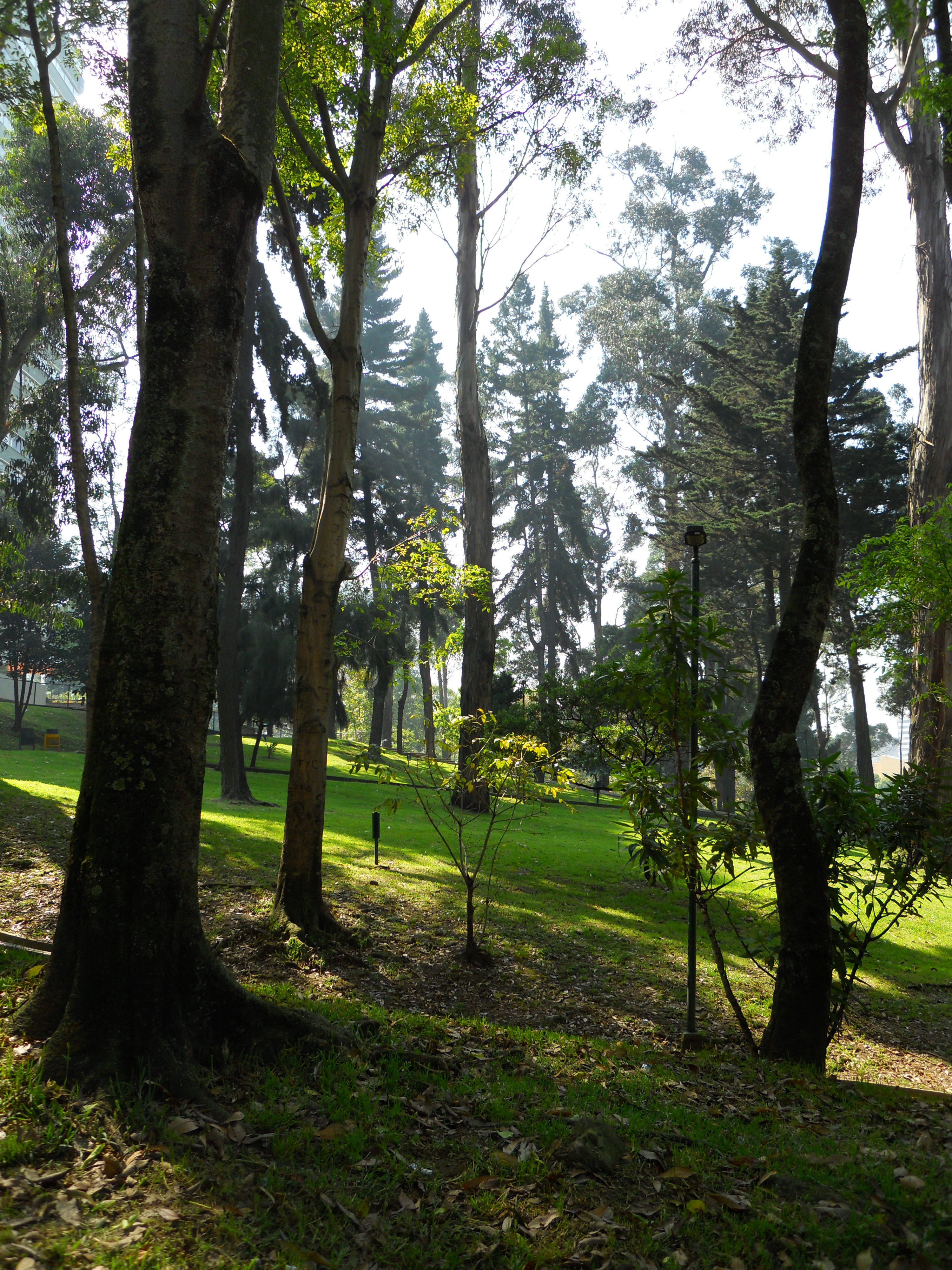 Bogotá, parte alta del Parque de la Independencia.